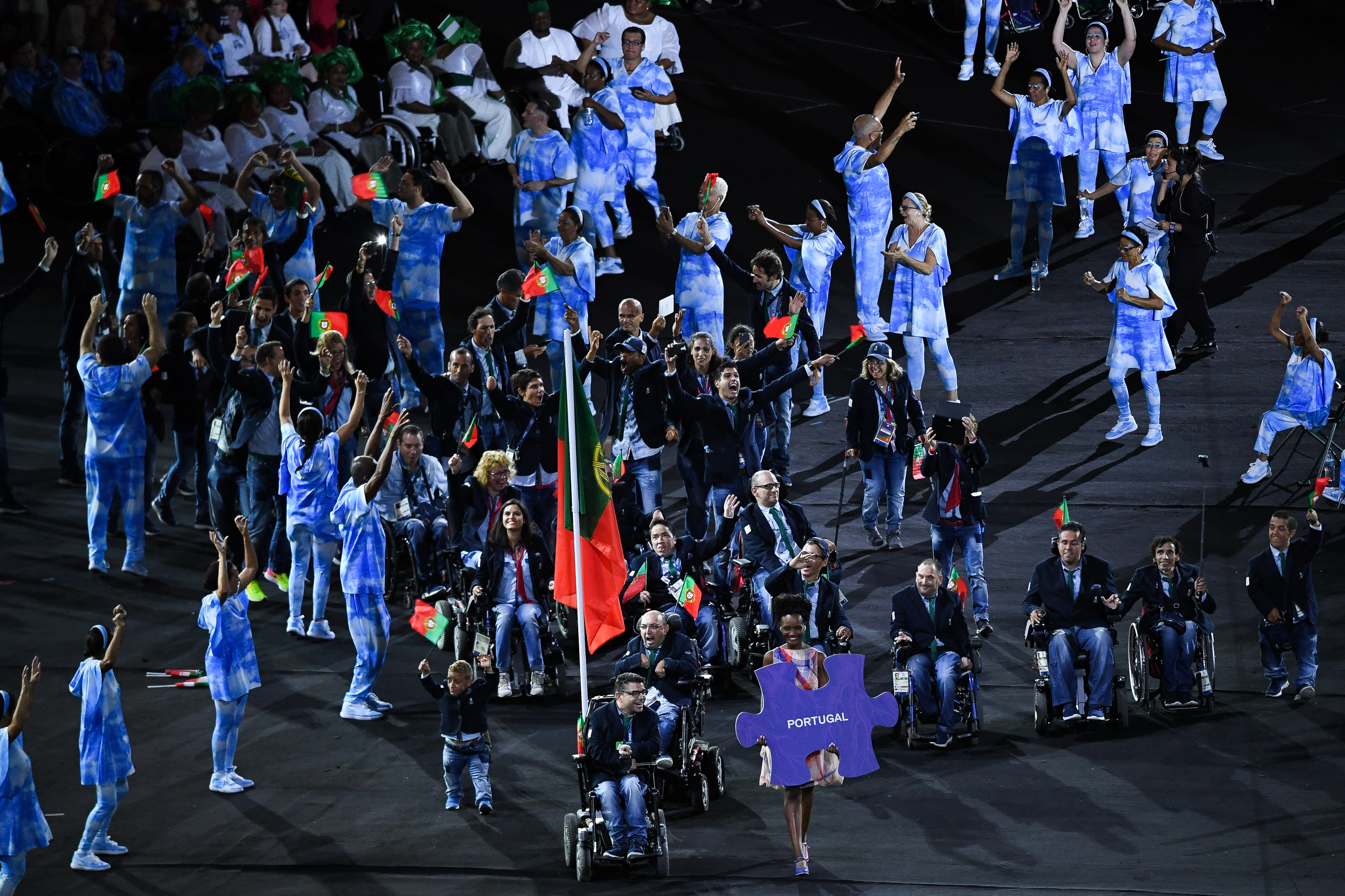 Rio de Janeiro - Cerimônia de abertura dos Jogos Paralmpicos Rio 2016 no Estdio do Maracanã (Tomaz Silva/Agência Brasil)